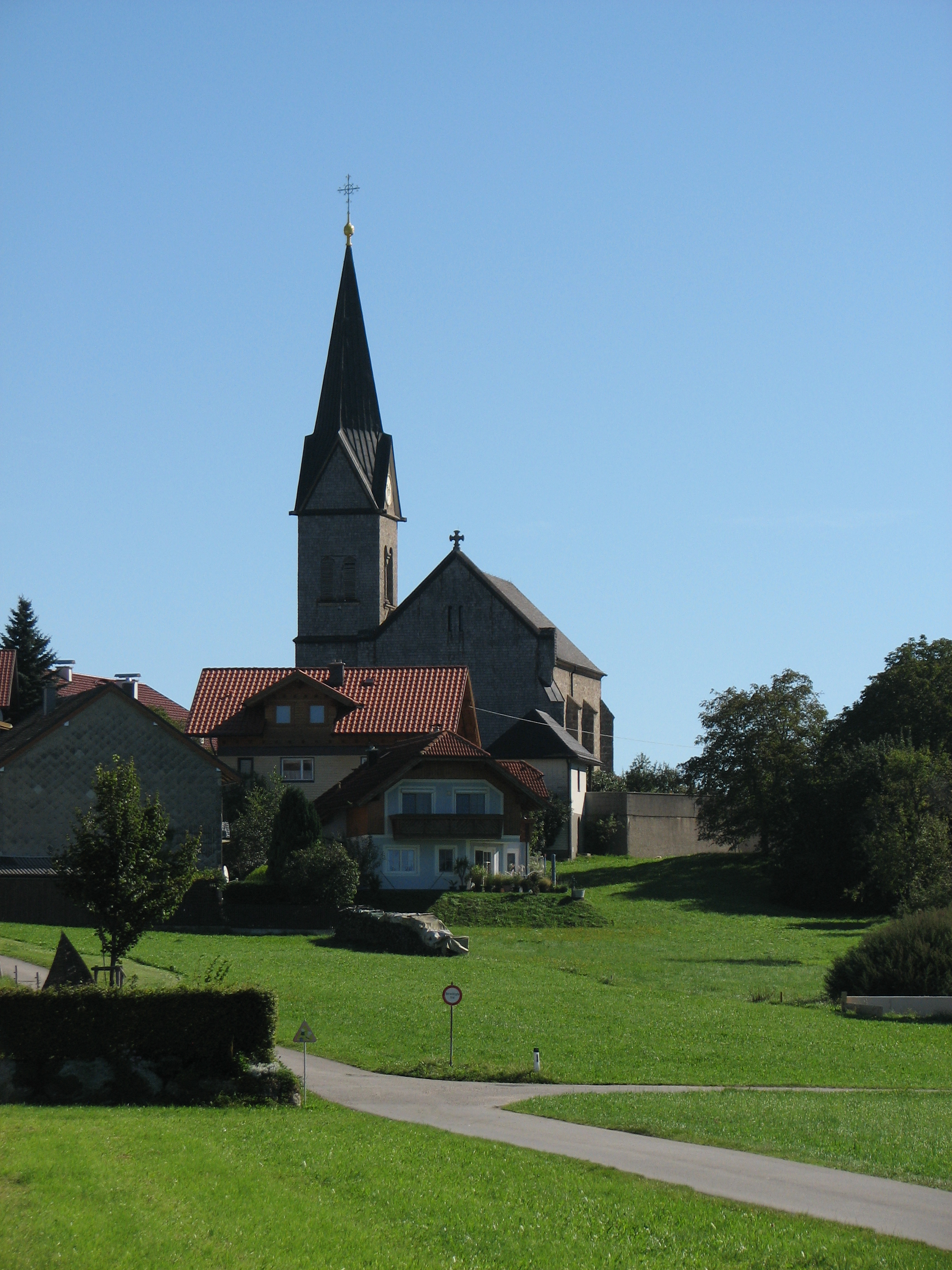 Kath. Pfarrkirche hl. Stephanus und Friedhof, Schleedorf